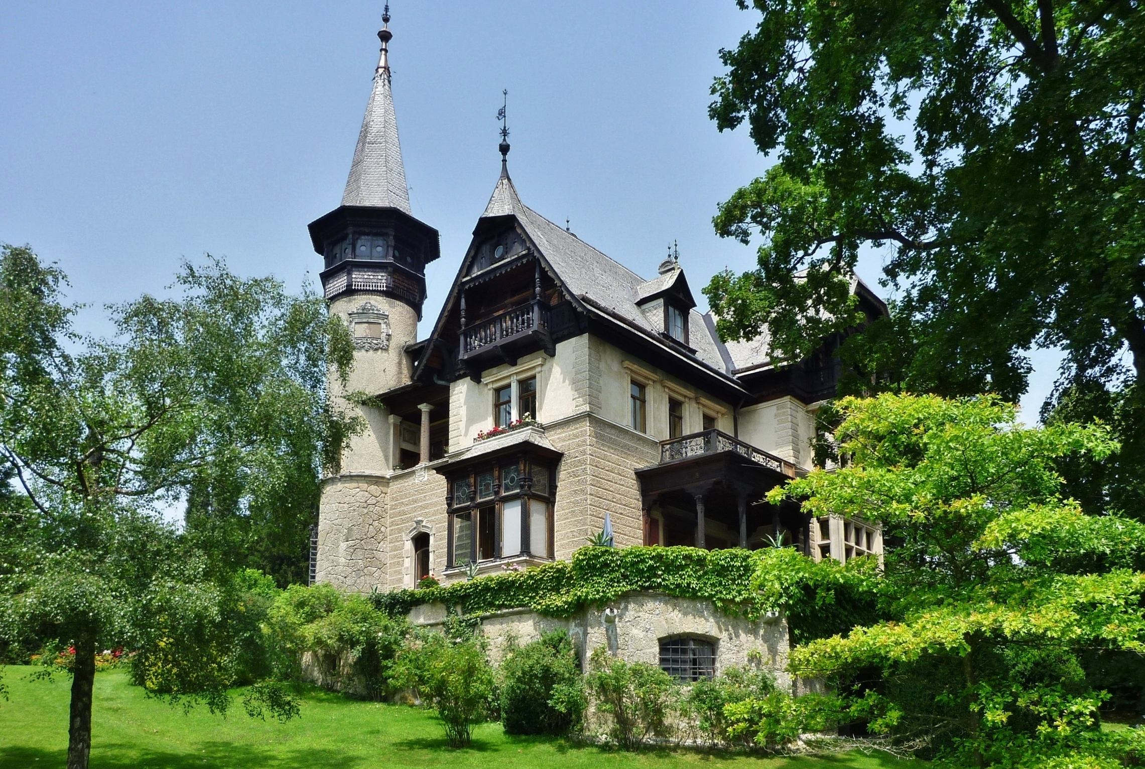 Villa Paulick, Bauherr Friedrich Paulick, k.u.k. Hoftischler in Wien, 1876-77 nach Plänen des Wr. Architekturbüros Friedrich König und Rudolf Feldscharek, runder Eckturm mit Aussichtsgalerie, Terrasse, Veranda, Loggia, Erker, Balkon